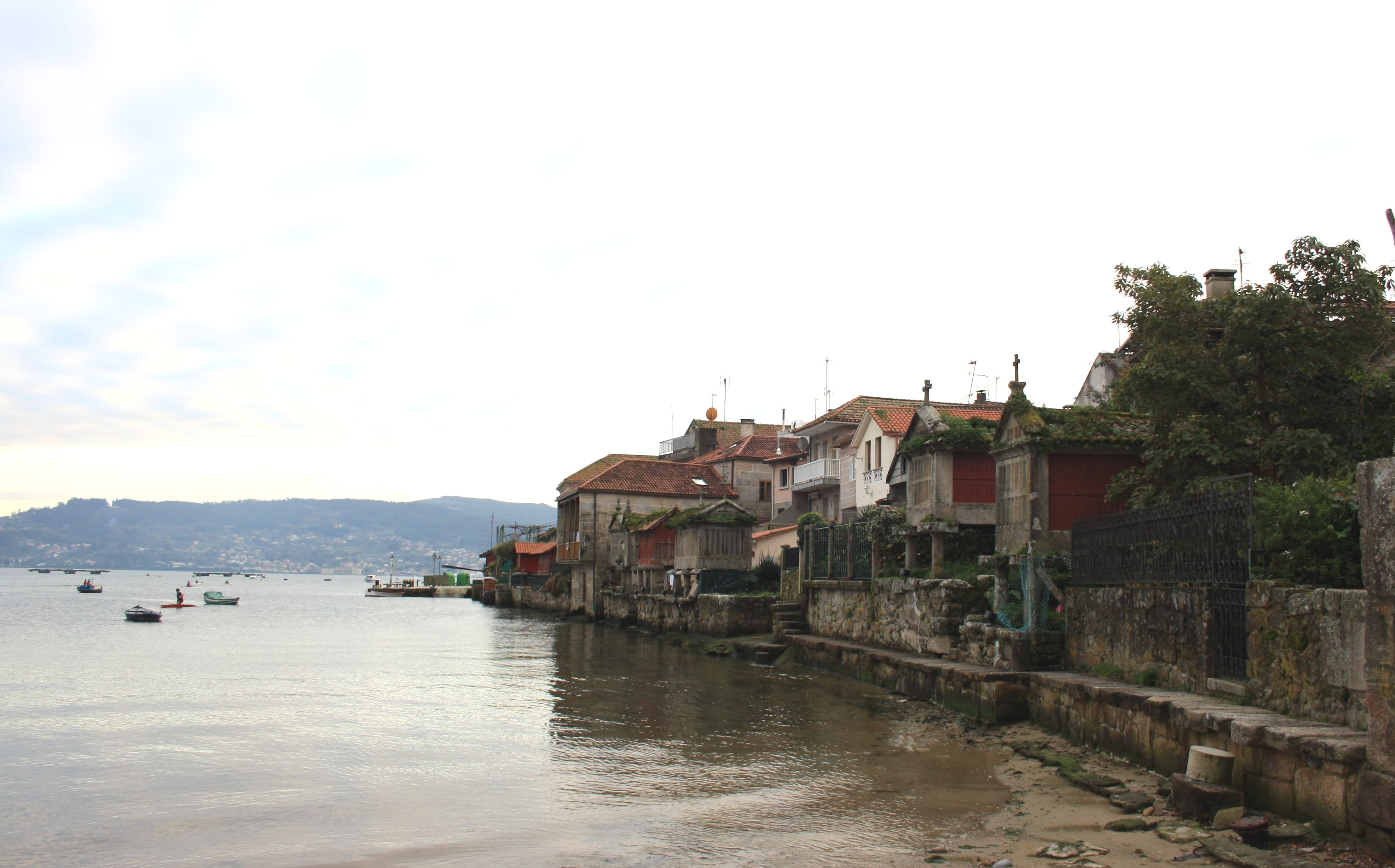 Casas de Combarro limítrofes con el mar